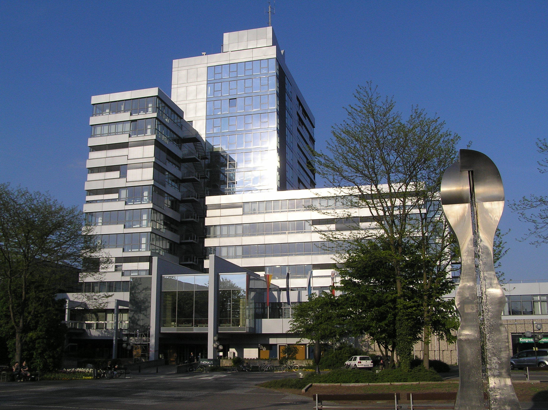 Ruckerbrunnen und Rathaus in Erlangen